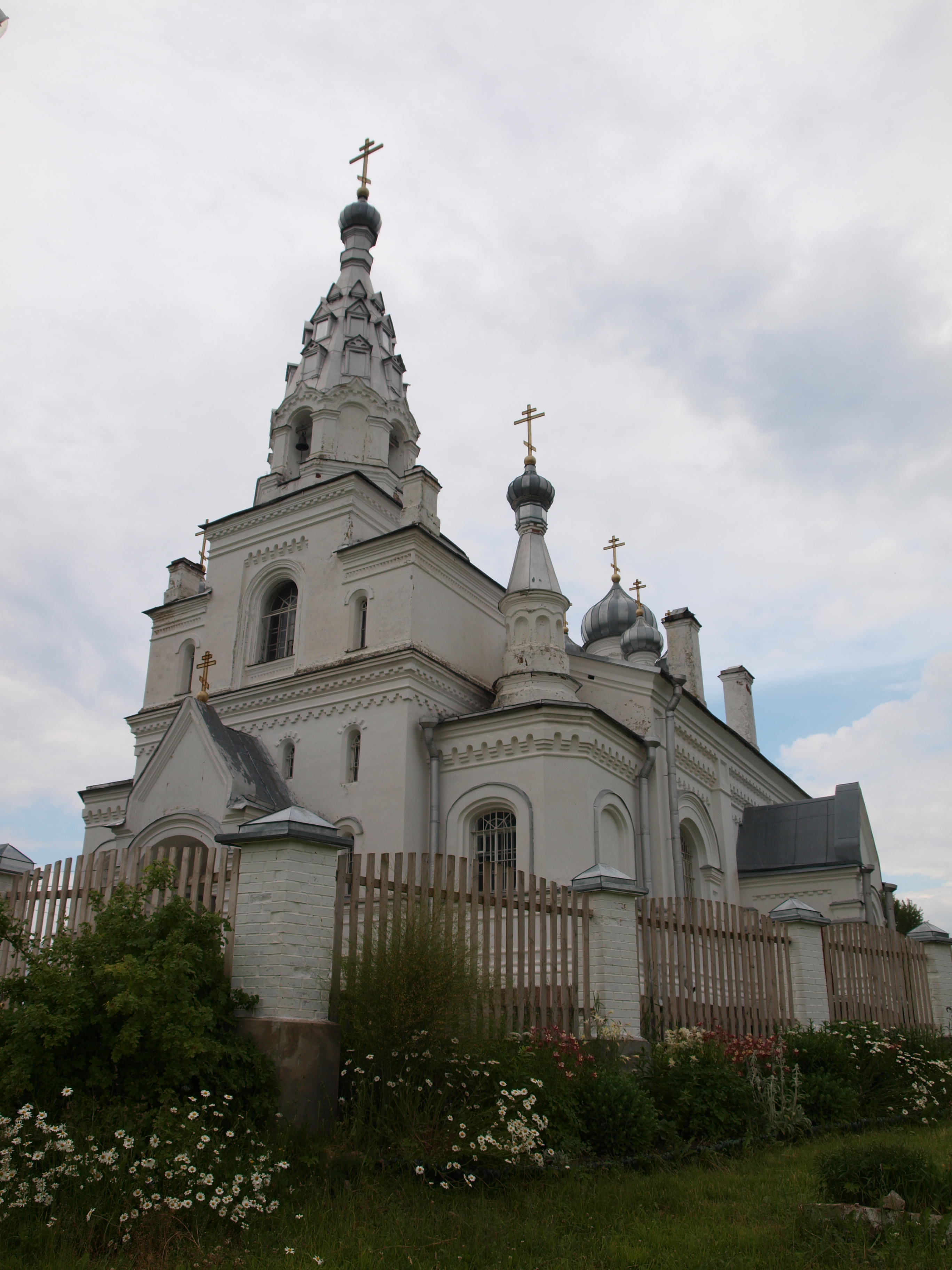 Покровская церковь: Козья гора, Сланцевский район, Ленинградская область